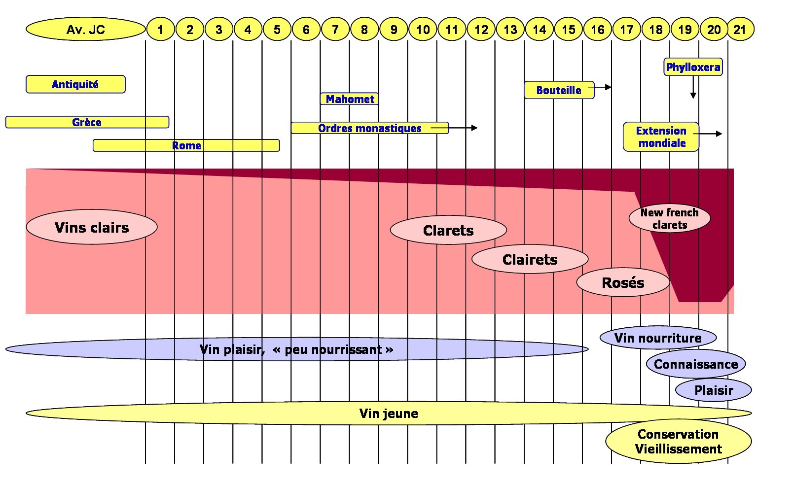 Schéma résumant l'évolution dans l'histoire de la proportion de vin rouge et rosé élaborée